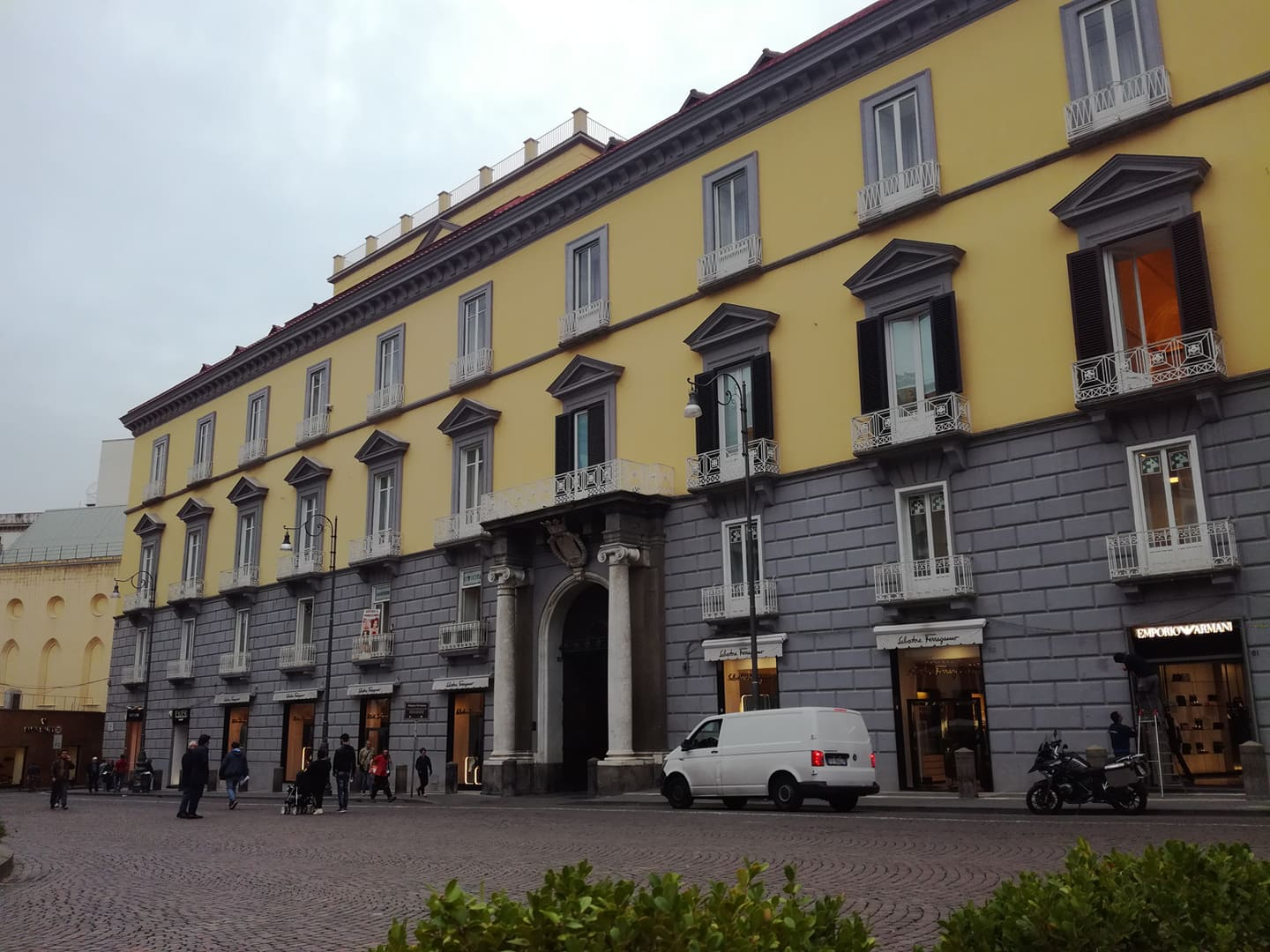 Palazzo Partanna (Napoli)